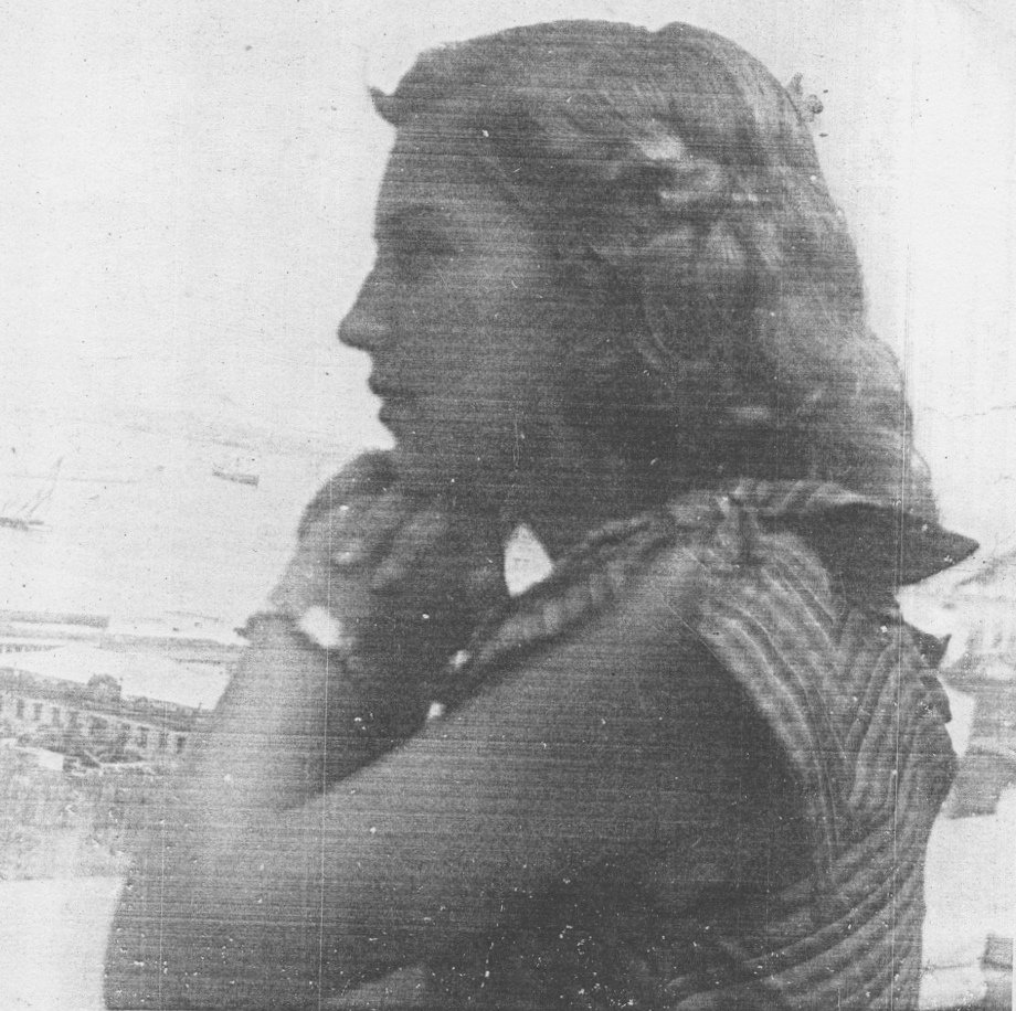 Admirando o horizonte